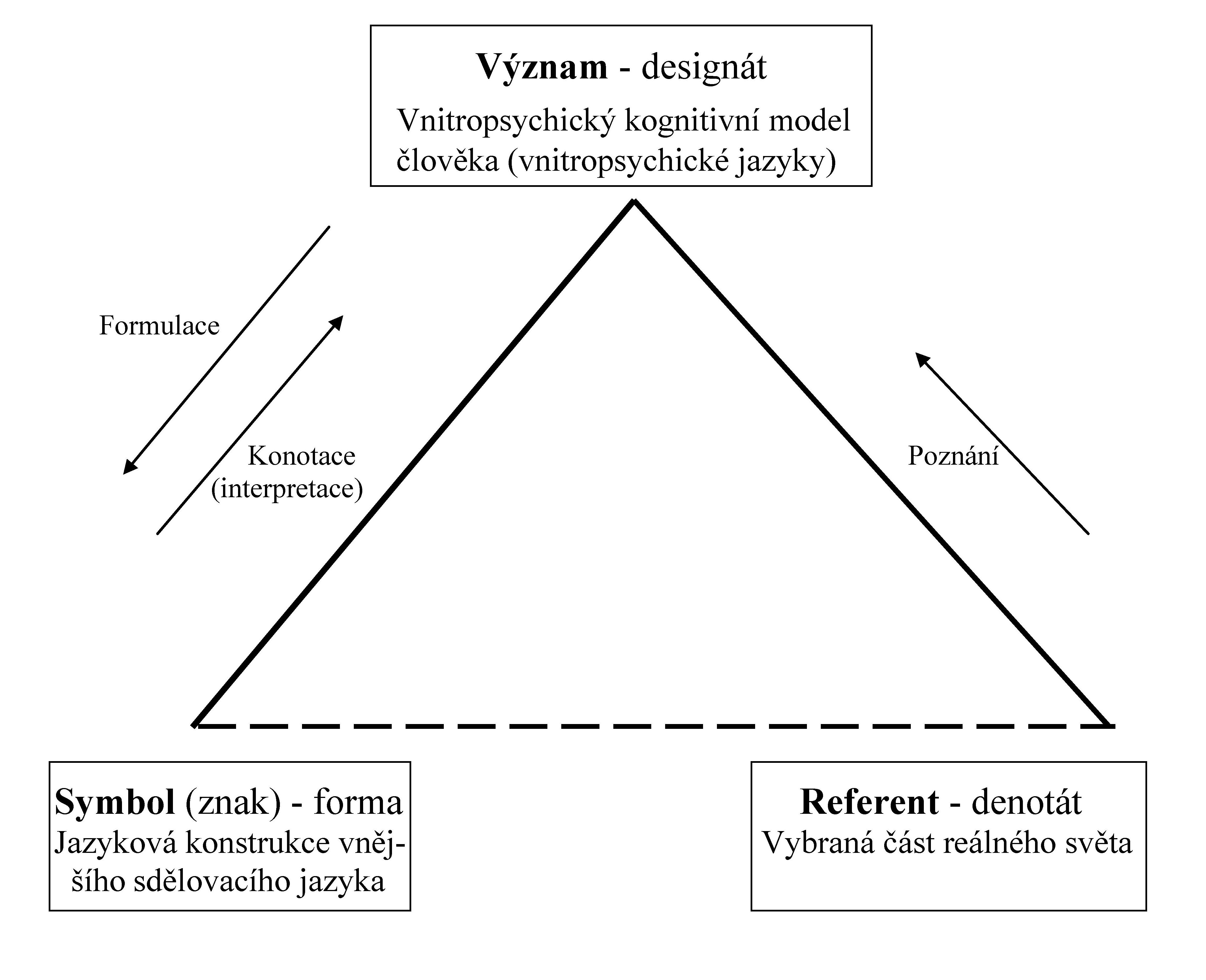 Sémantický trojúhelník. Schematické znázornění: Souvislosti mezi reálným světem, jeho poznáním, na základě poznání vytvořeným vnitropsychickým kognitivním modelem a sdělením o poznaném.